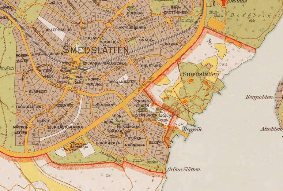 Smedslätten på del av Karta "Äppelviken" från 1917-1933